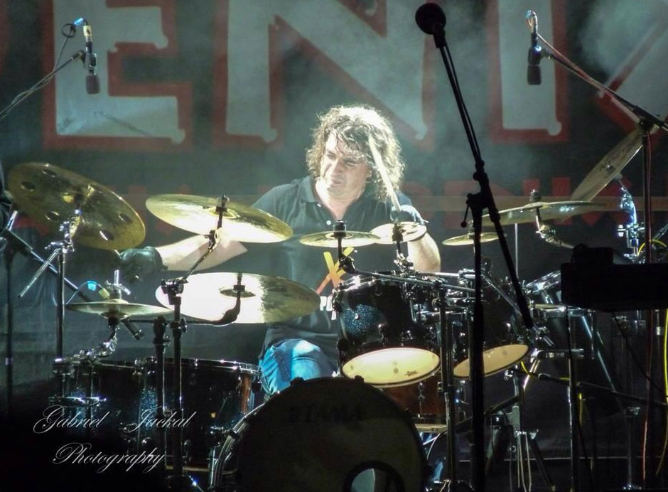 Ionut John Micu la concert Phoenix - Constanţa 2013